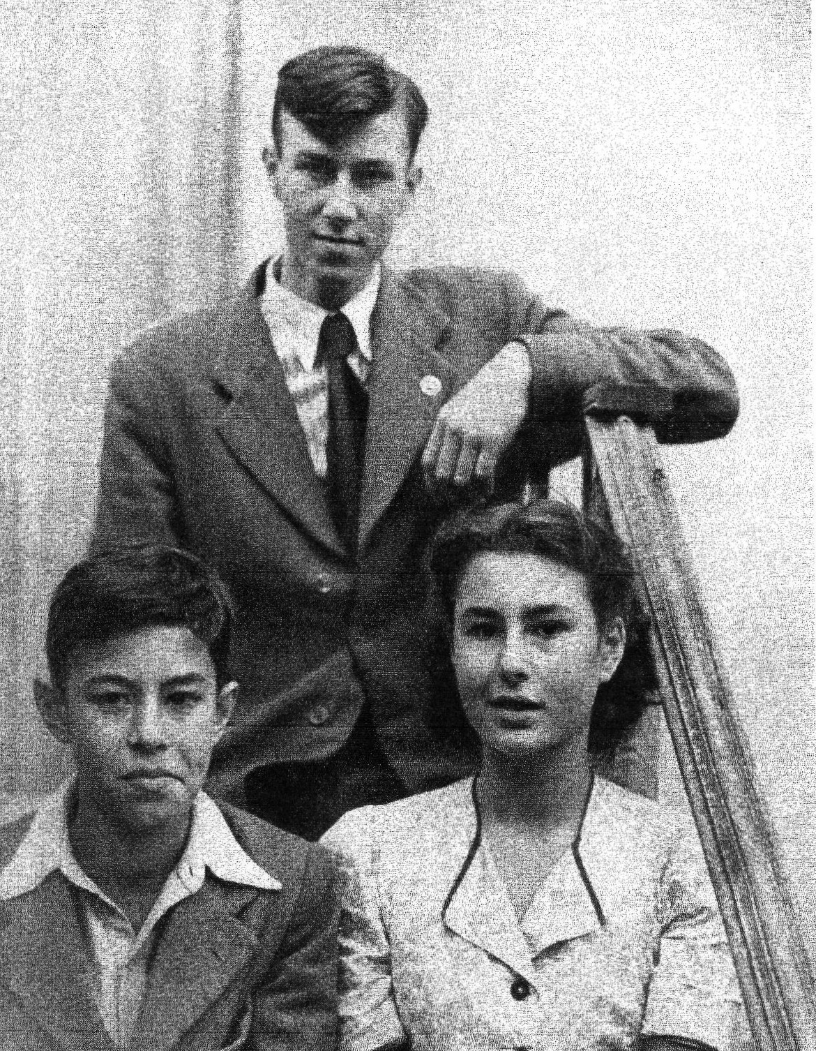 la famiglia Clunies-Ross (penultima generazione), re feudali delle isole Cocos (Australia)